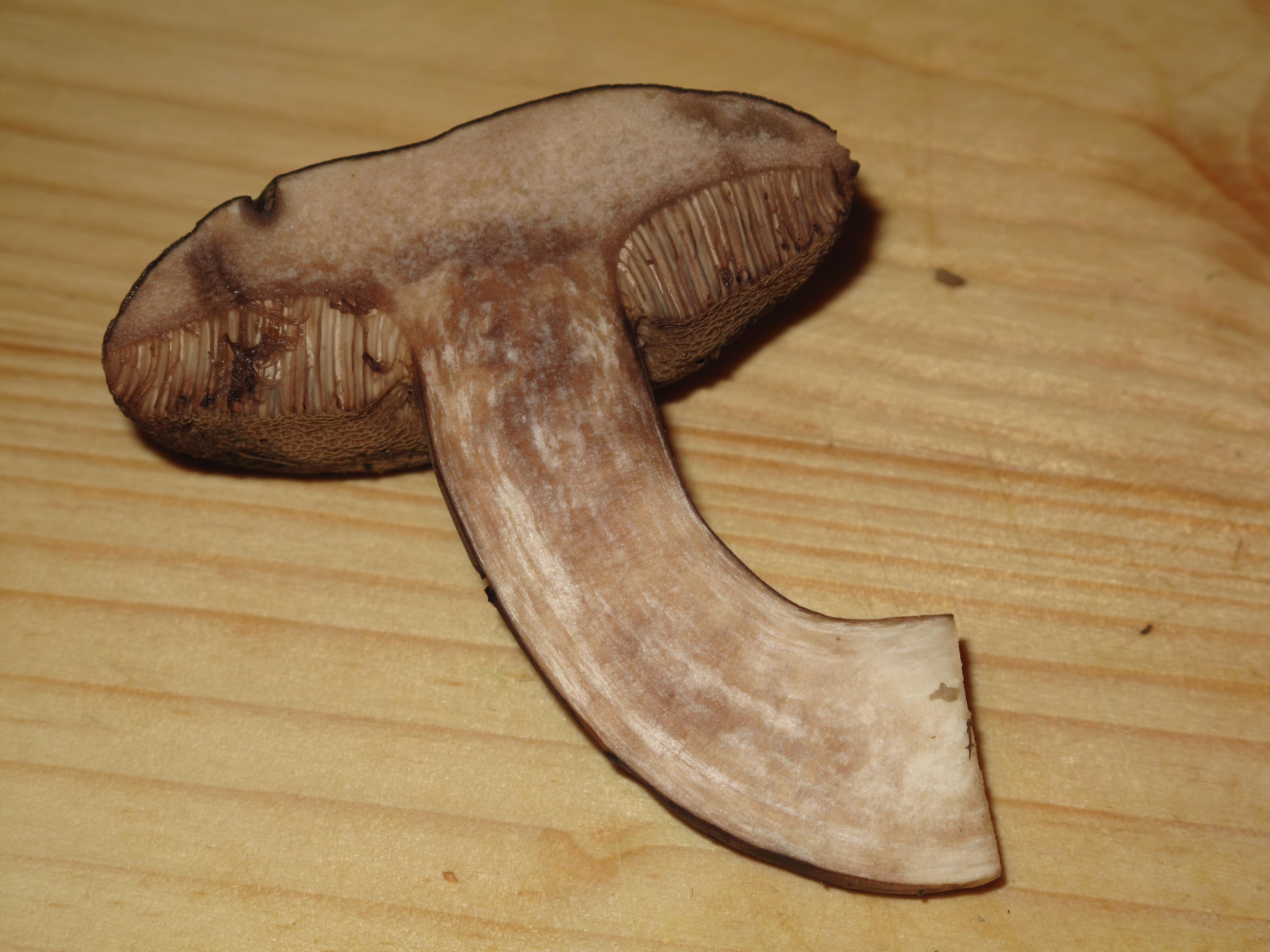 Hřib nachovýtrusný